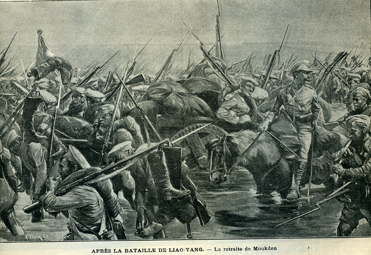 see picture